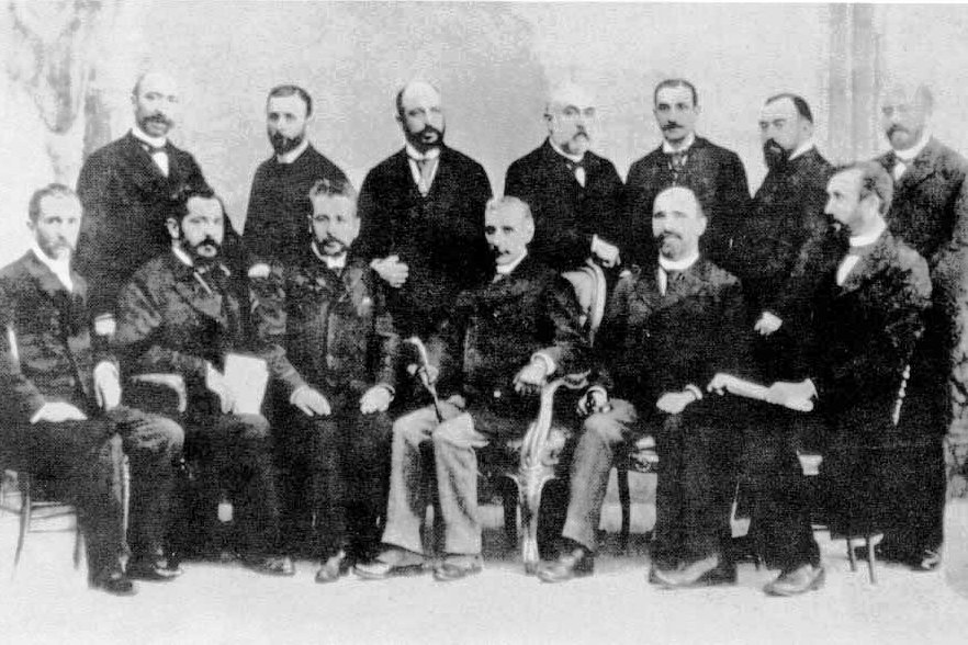 1894. Comisión vascongada Localización: Madrid